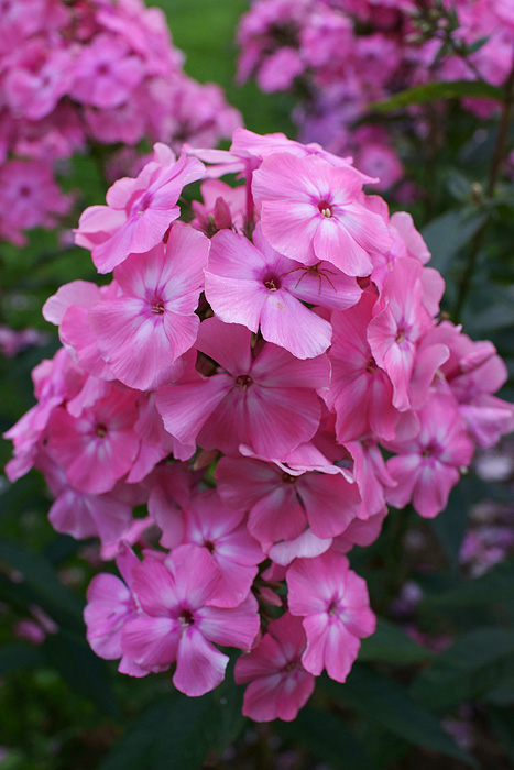 Флокс метельчатый 'Москвичка' ('Moskvitchka') М.П. Нагибина, 1939